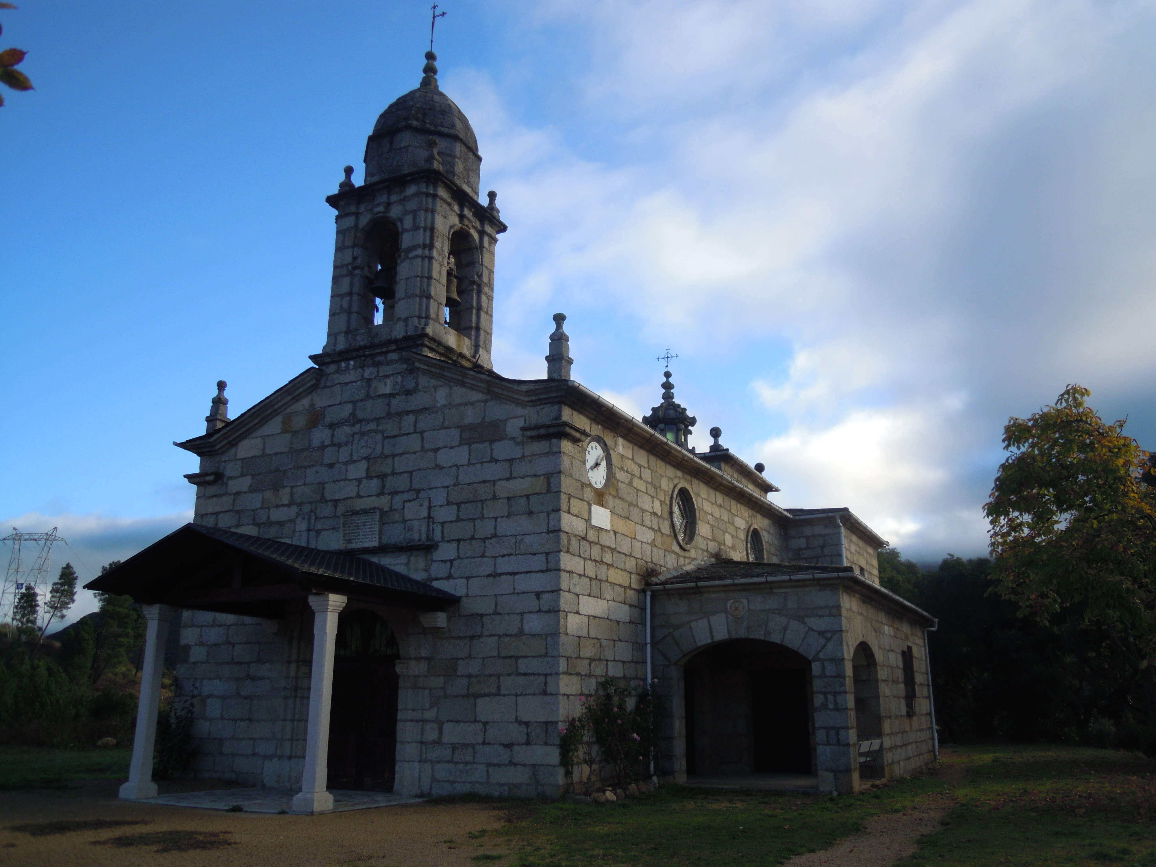 Igrexa parroquial da Veiga de Cascallá (Rubiá), antiga igrexa da Alberguería (A Veiga)